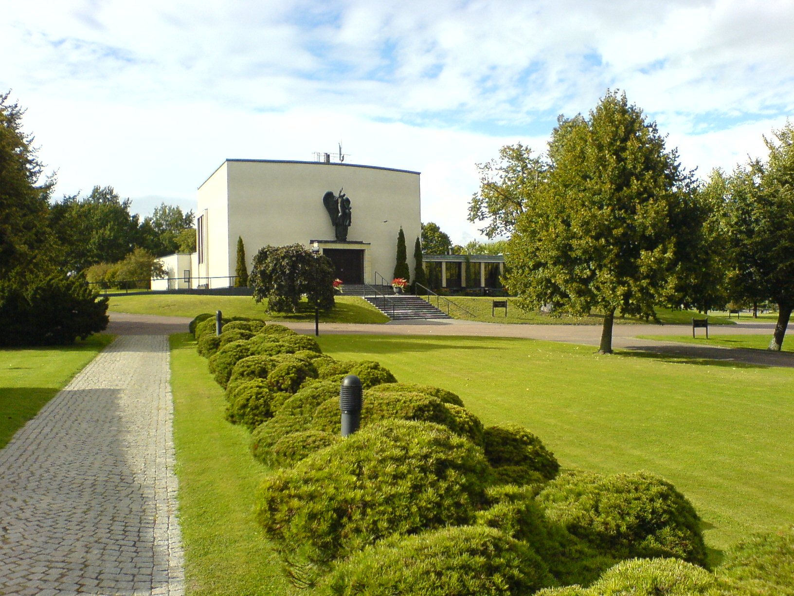 Norra kyrkogården i Norrköping september 2007. Kapell med tillhörande krematorie.